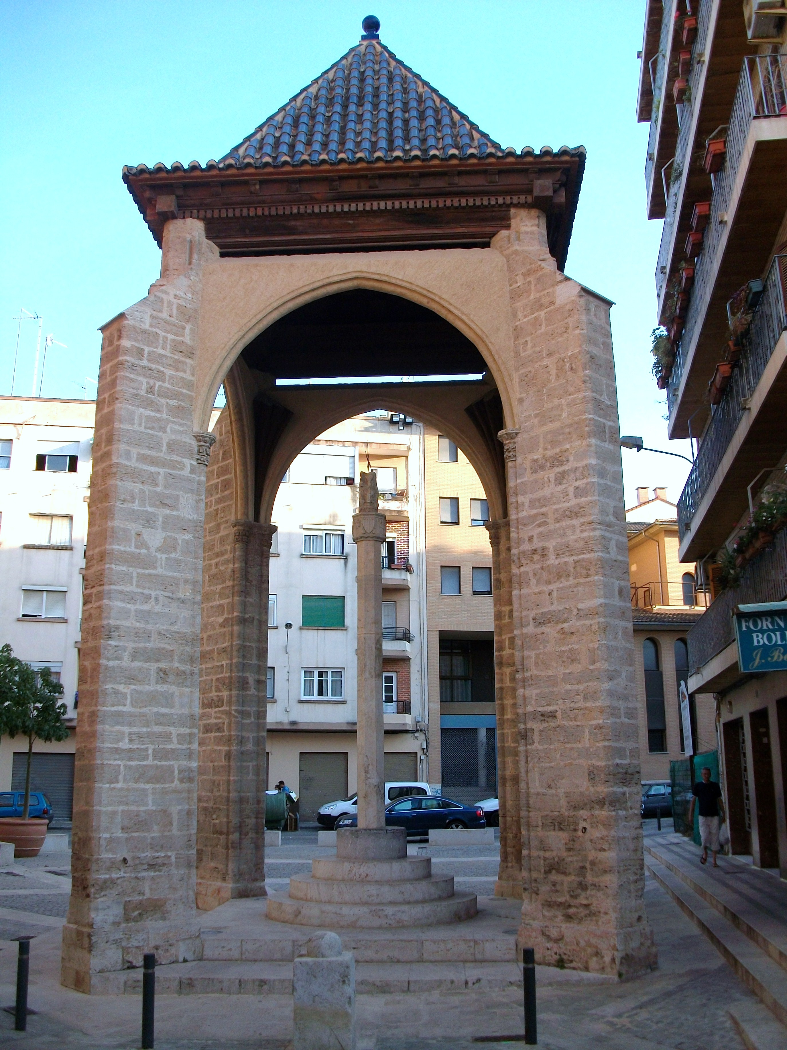 Creu Coberta de Mislata, l'Horta, País Valencià.